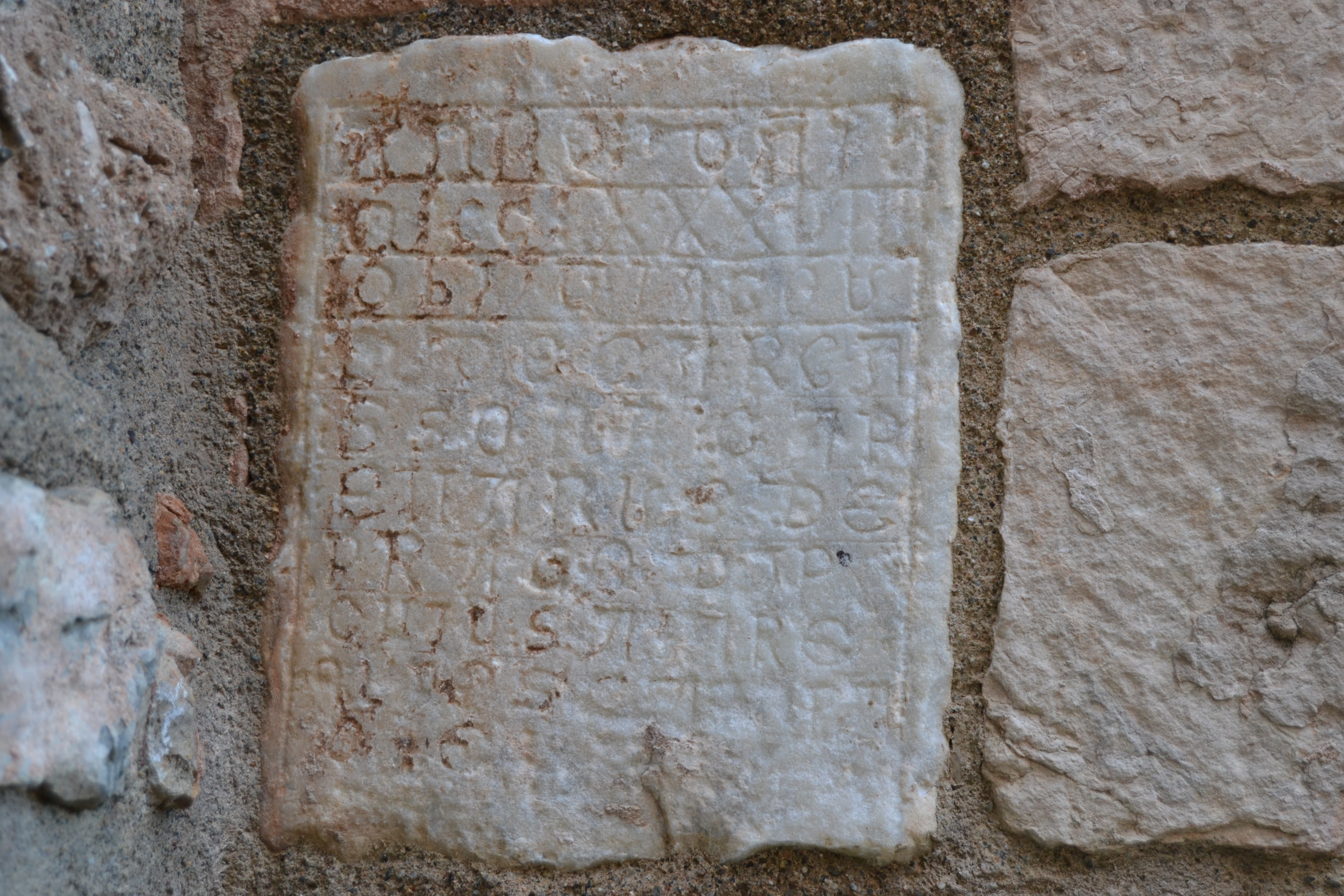 Església parroquial del Natalici de la Mare de Déu (Pratdip)